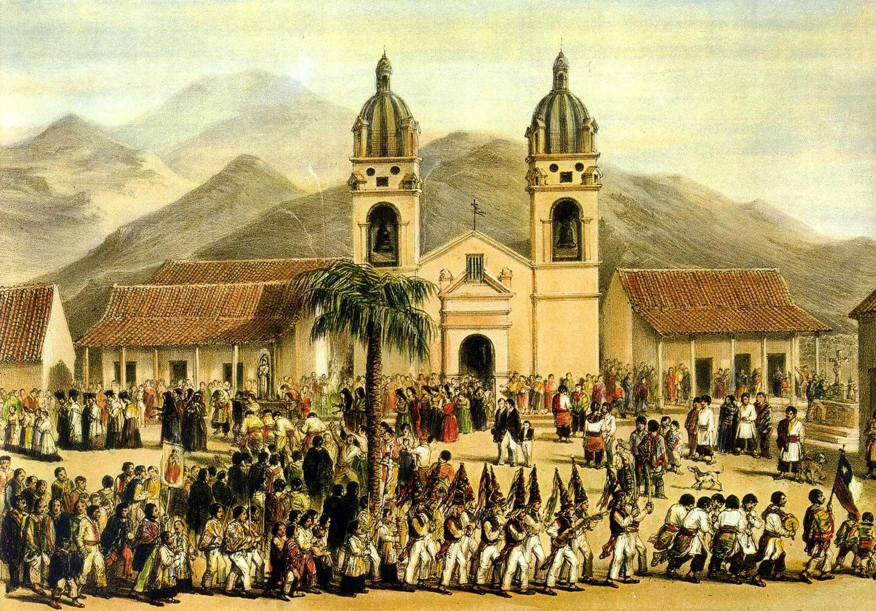 Fiesta en Honor a la Virgen del Rosario de Andacollo (Chile) 1838.